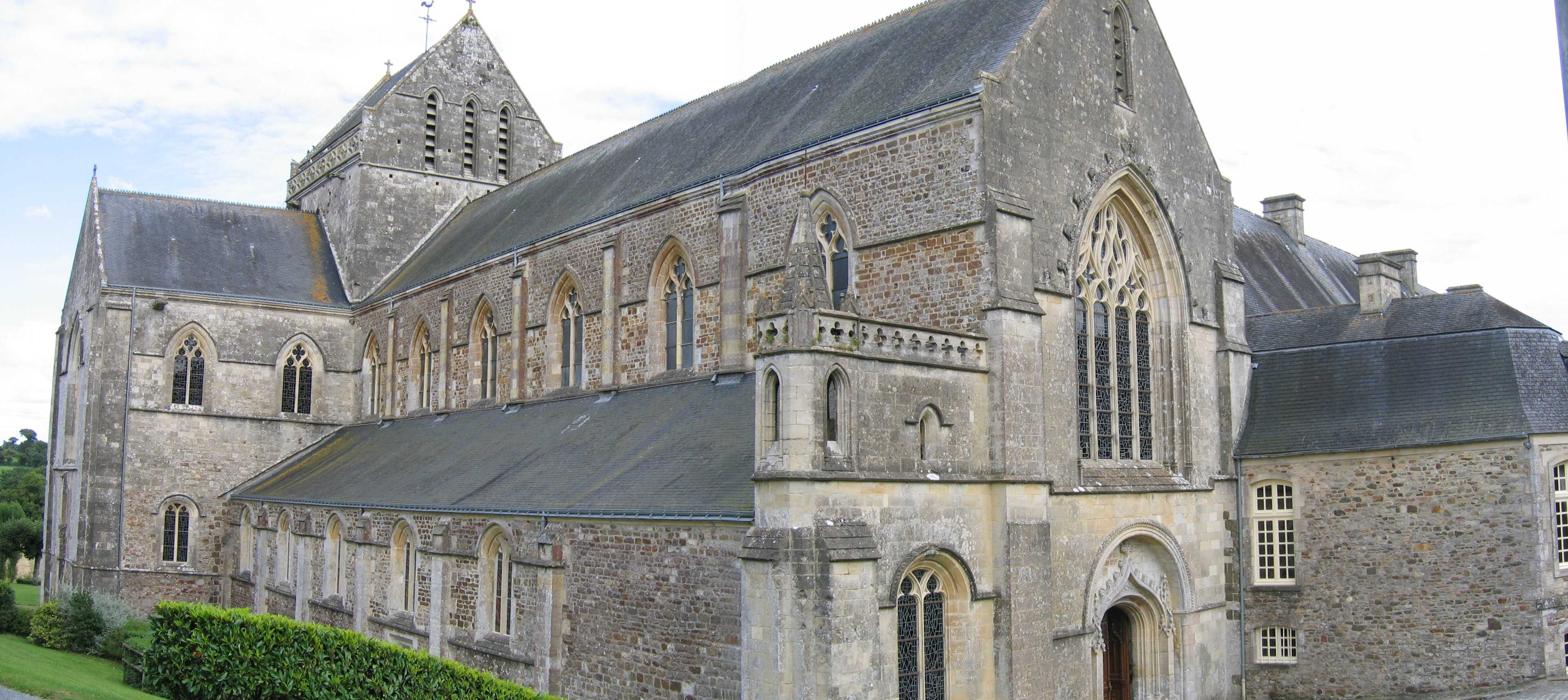 L'Abbaye de Saint-Sauveur le Vicomte actuelle(2007)